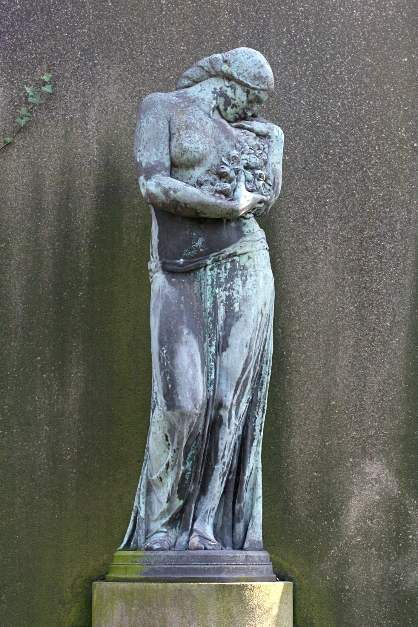 "Persephone" von Benno Elkan, 1908. Grabmal auf dem Ostenfriedhof in Dortmund, Wk-Nr. 115, auch als polychrome Version 1910, Wk-Nr. 10